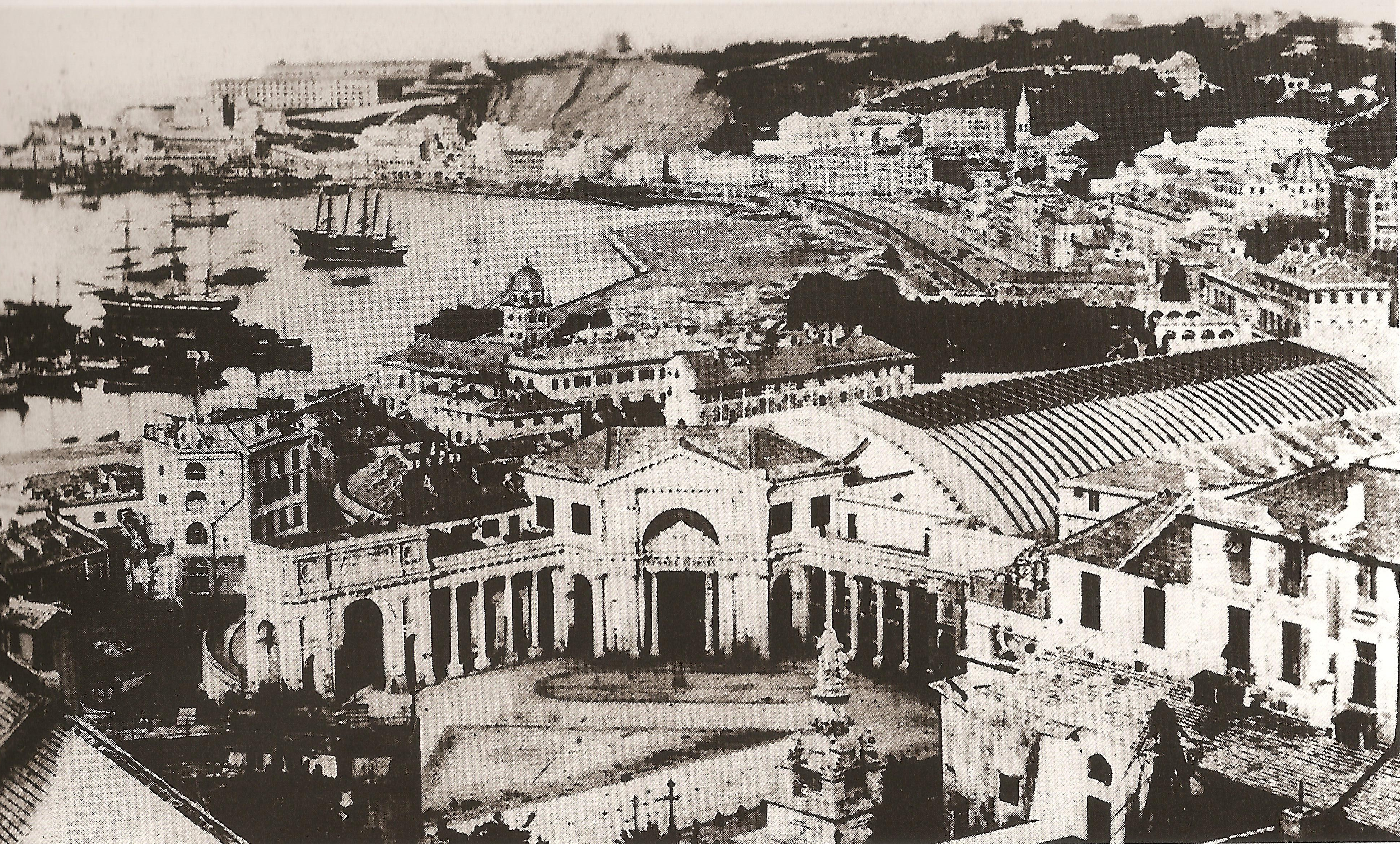 Fabbricato viaggiatori della stazione ferroviaria Genova Principe, iniziato nel 1854 e terminato nel 1860